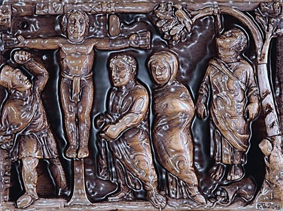 Una de las primeras representaciones de Cristo en la cruz. Una representación artística hecha por mi en paint a partir de un original en Marfíl del Museo Británico de Lóndres.